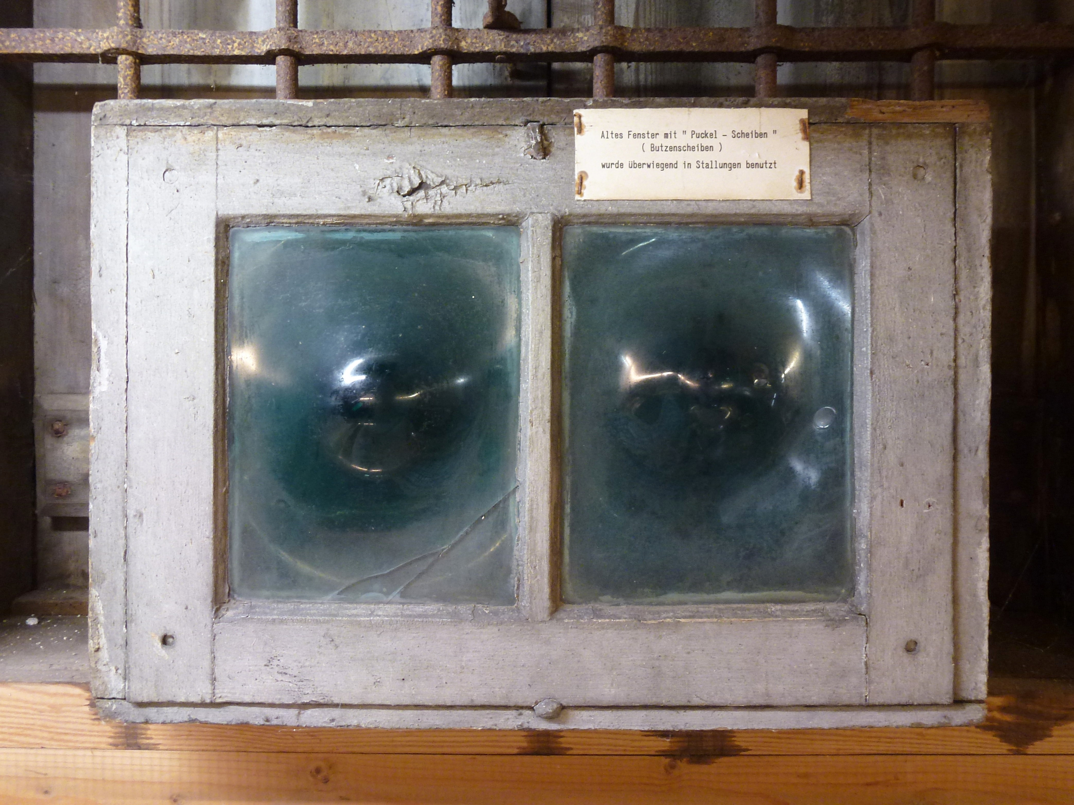 Windmühle Lemkenhafen, Fenster mit Butzenscheiben im Museum